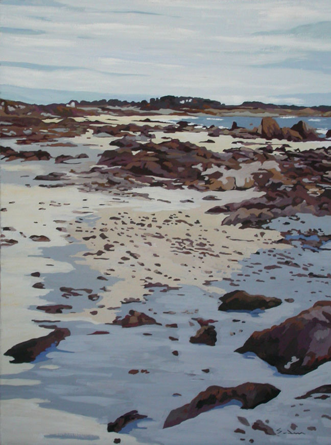 Allez dire à la ville